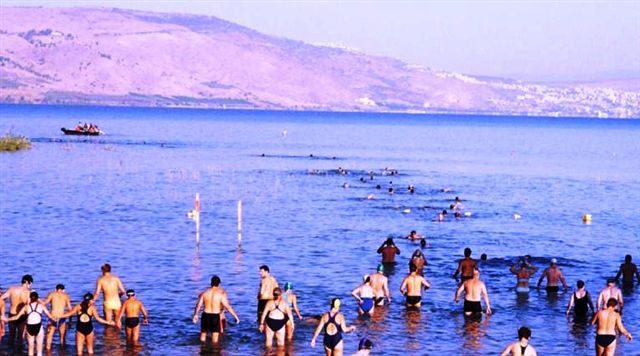 צליחת הכנרת - זינוק